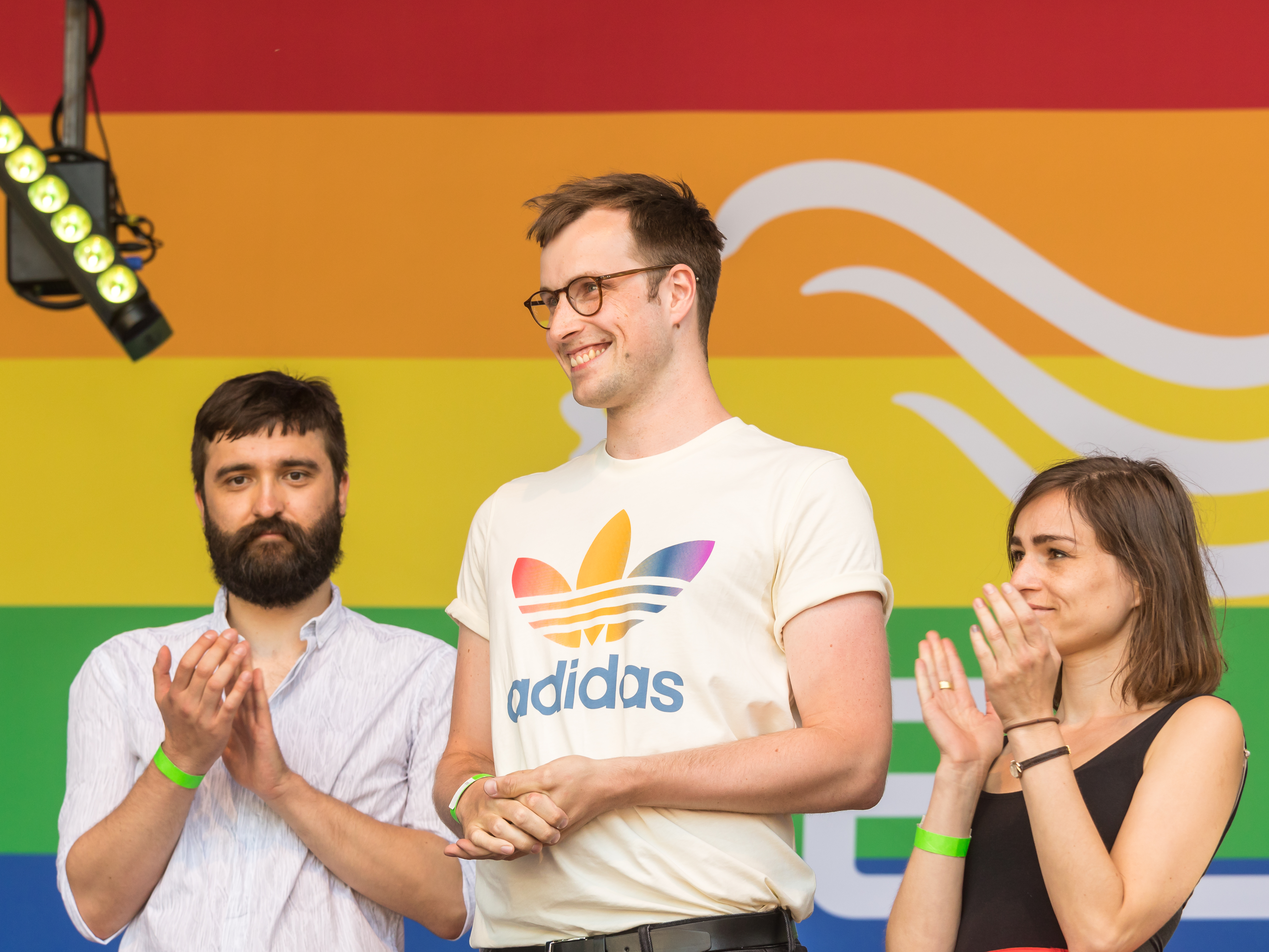 ColognePride/CSD 2018 - Verleihung des Felix-Rexhausen-Preises Foto: Nach Bekanntgabe des Preisträger: Johannes Nichelmann (Mitte) für „Tabuthema Bisexualität: Vom Stigma, auf Frauen und Männer zu stehen“, Deutschlandfunk Kultur